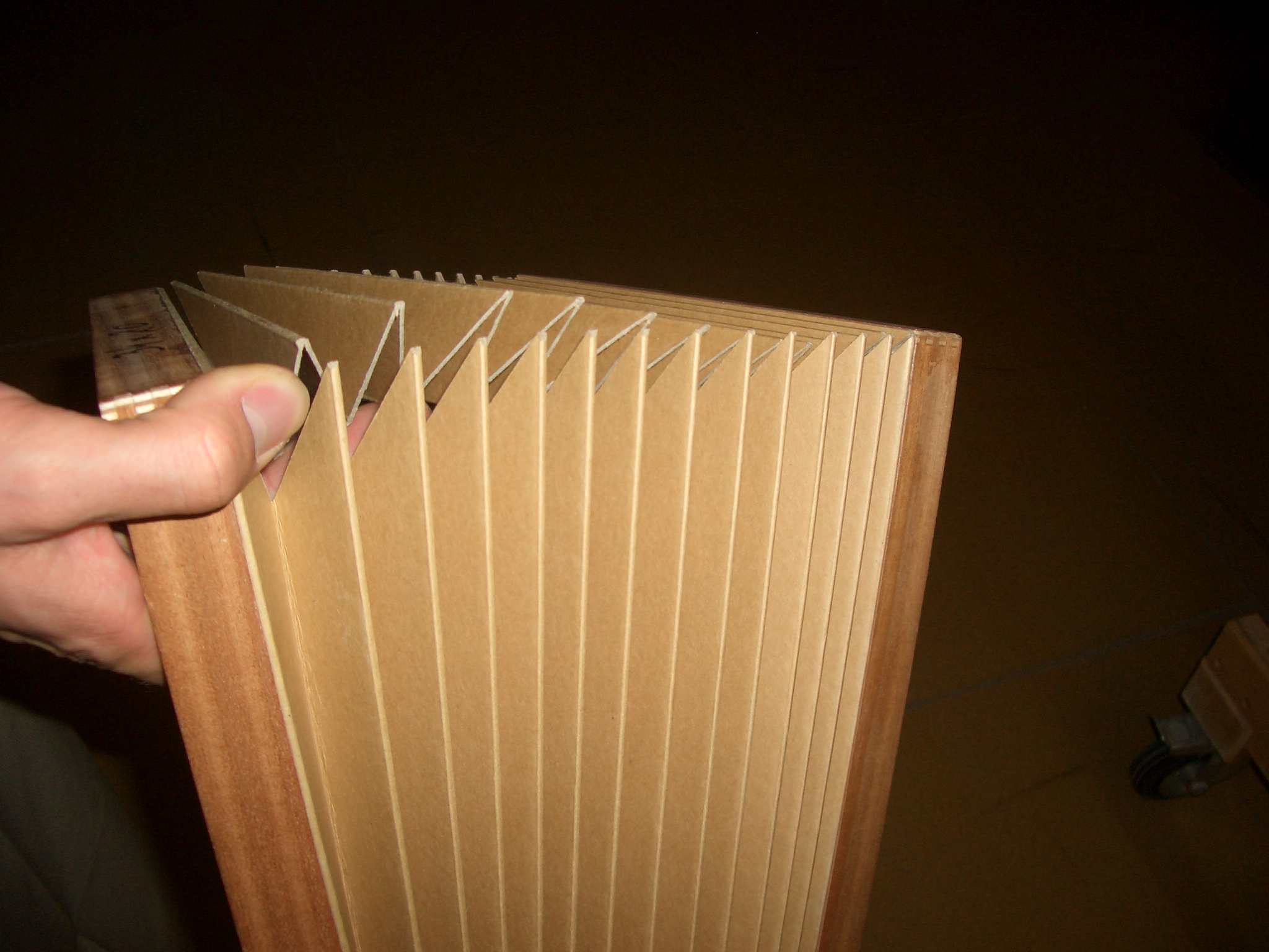 Strasser Werksführung - Balg roh